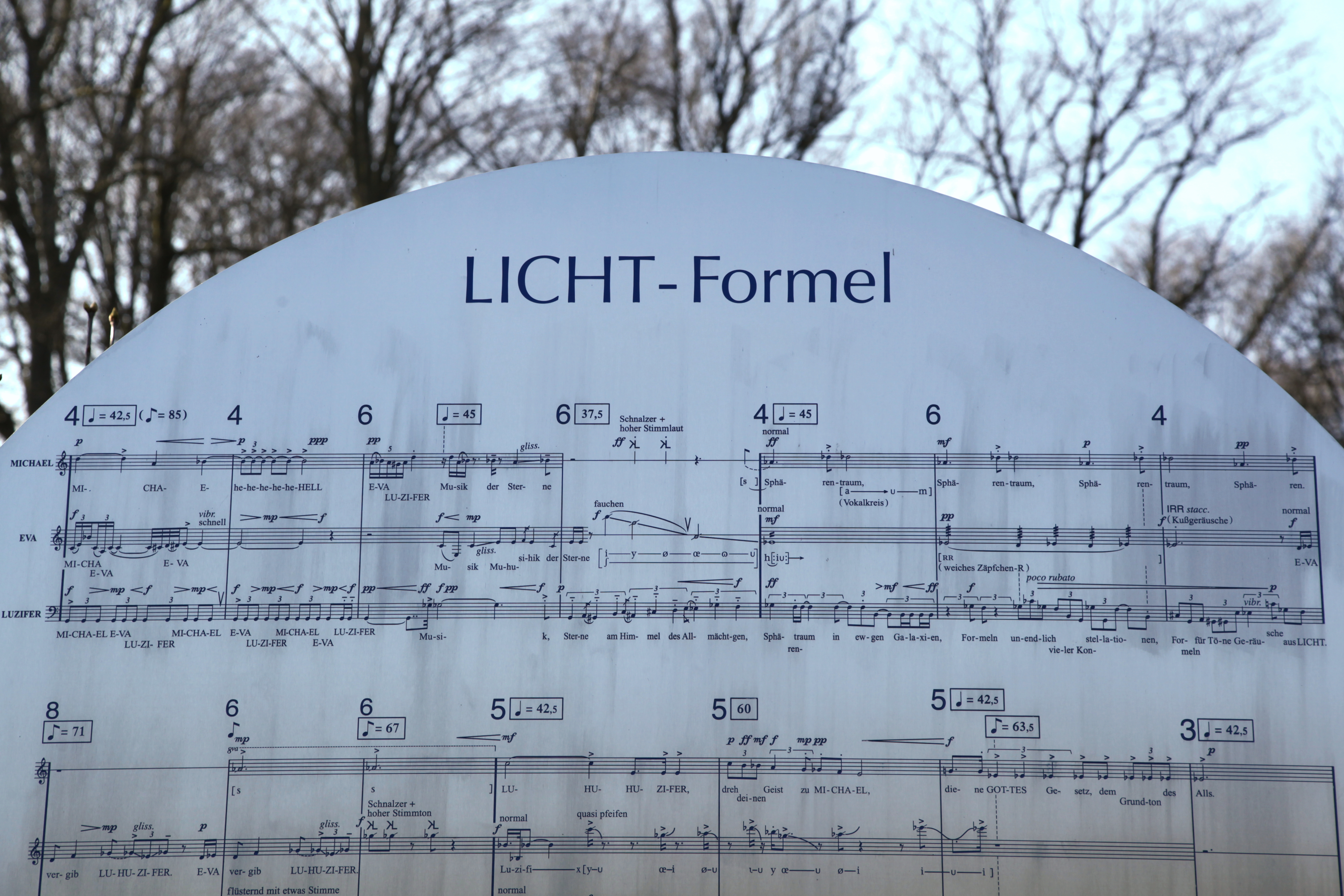 Karlheinz Stockhausens Grab auf dem Waldfriedhof in Kürten